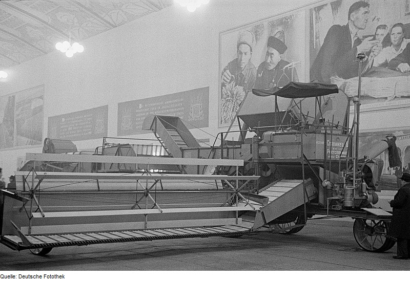 Original image description from the Deutsche Fotothek Erntefahrzeug